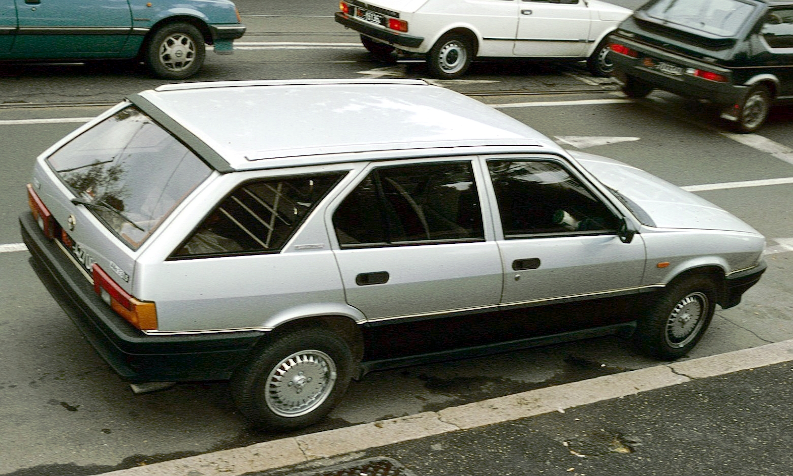 Alfa Romeo 33 break in Rome (Via dei Fori Imperiali)